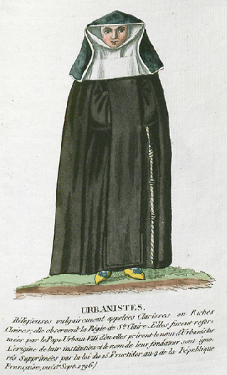 Collection de costumes de tous les ordres monastiques, supprimés à differentes époques, dans la ci-devant Belgique, Bruxelles, Philippe Joseph Maillart et sœur, 1811